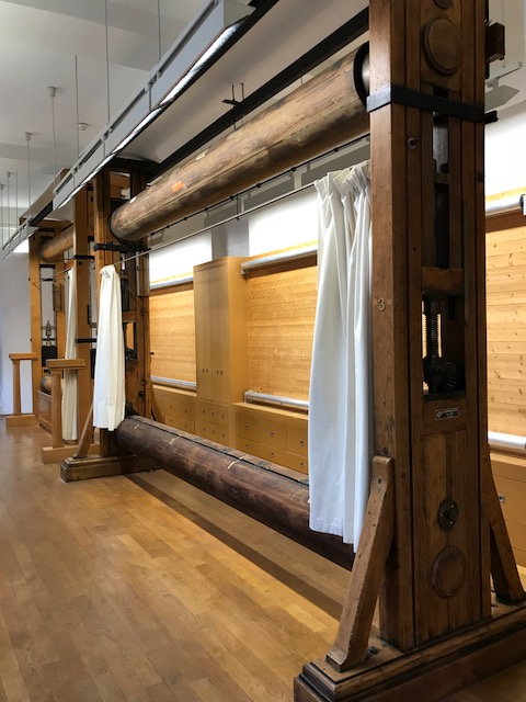 Permettant la réalisation de tapisseries de haute lice